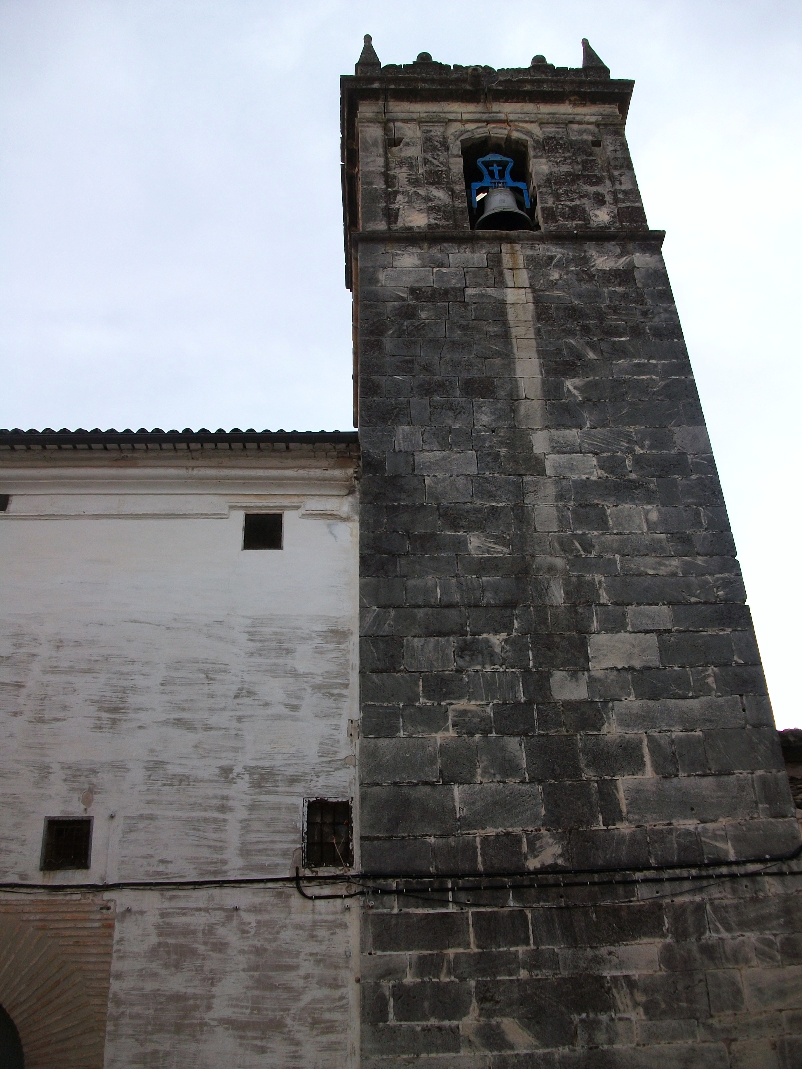 Campanar de l'església del Salvador, Cocentaina.